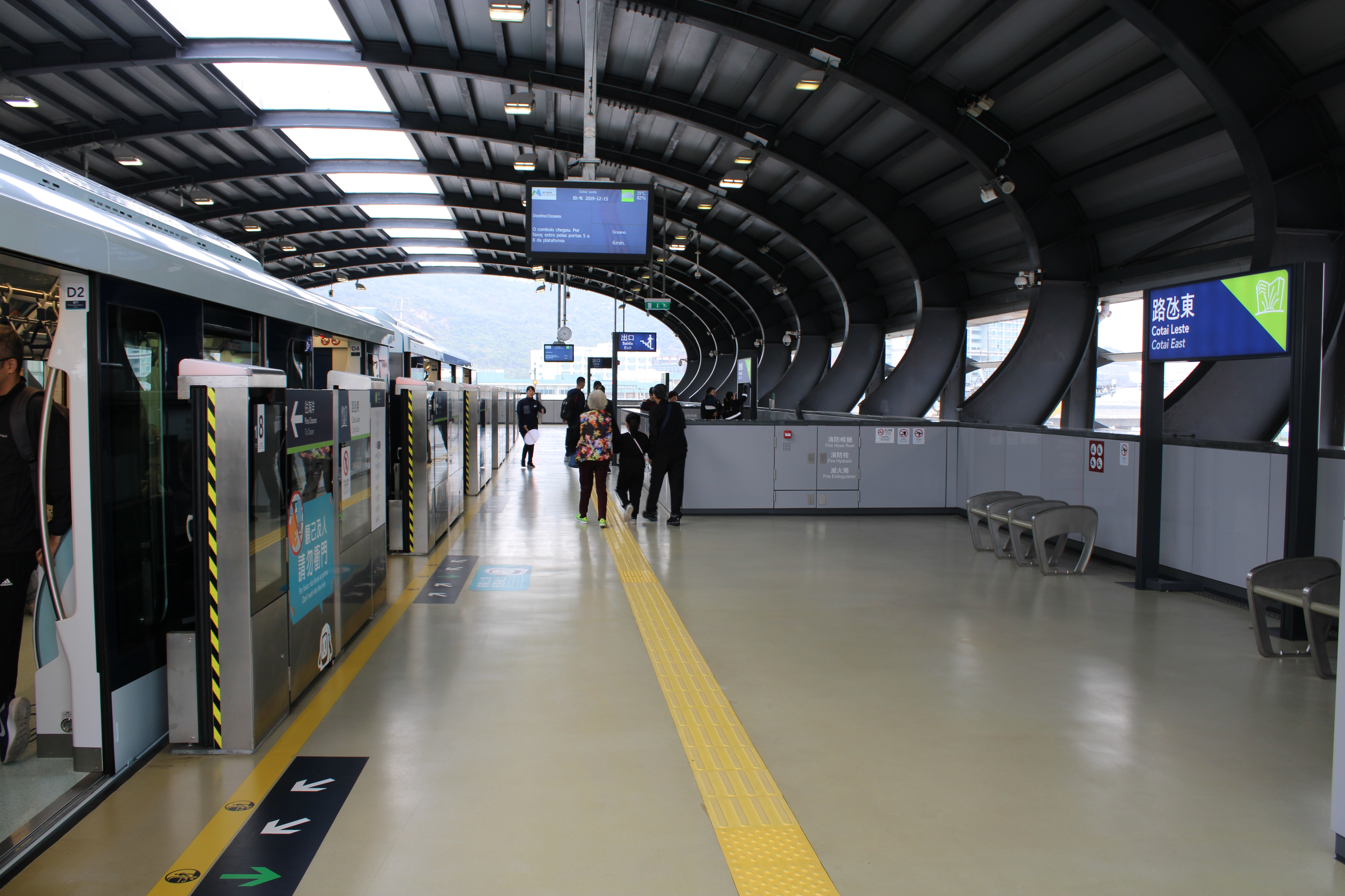 2019年12月的澳門輕軌氹仔線路氹東站月臺。